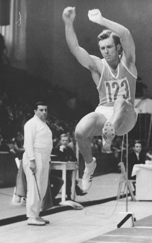 Max Klauß Zentralbild Mittelstädt 14.2.71 Berlin: DDR-Leichtathletik-Hallenmeisterschaften 1971. Im Weitsprung der Herren holte sich Max Klauß (SC Einheit Dresden) mit 7,81 m den Meistertitel.